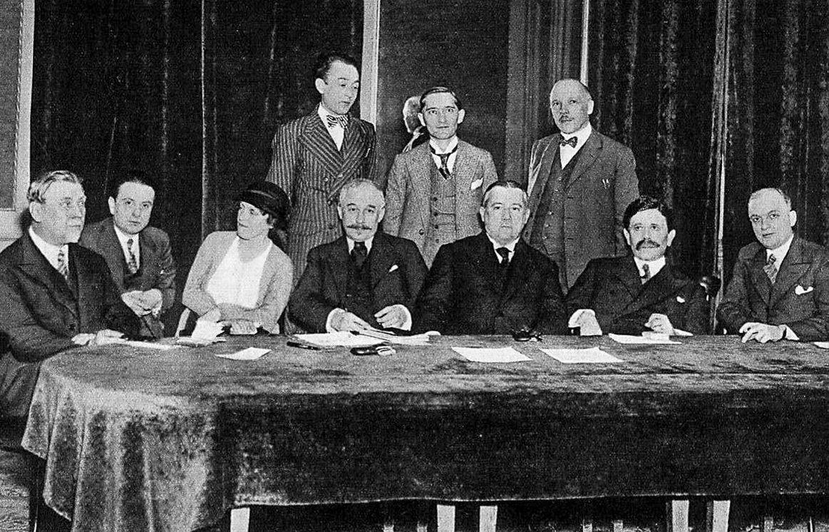 En Deel vum Comité vun der Société des écrivains luxembourgeois de langue française SELF, 1934 - 1935.